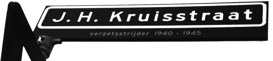 Straatnaambord in Heerenveen. Tot 15 januari 1946 heette deze straat "Hoofdstraat".